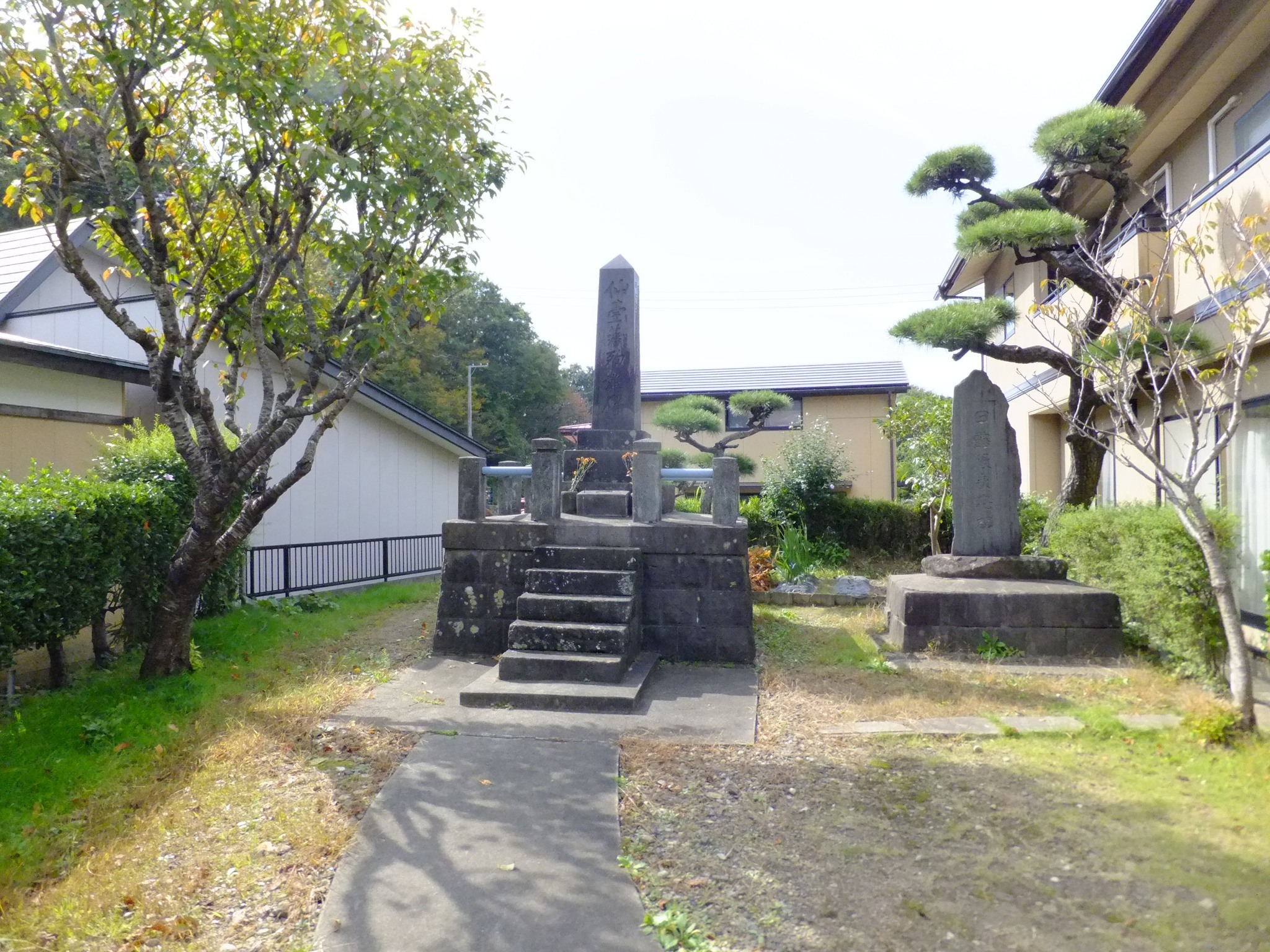 1868年、仙台藩の使節が久保田（現在の秋田市）において殺害され、秋田戦争の引き金となった事件で、殺害された仙台藩士を慰霊するため建立された石碑。